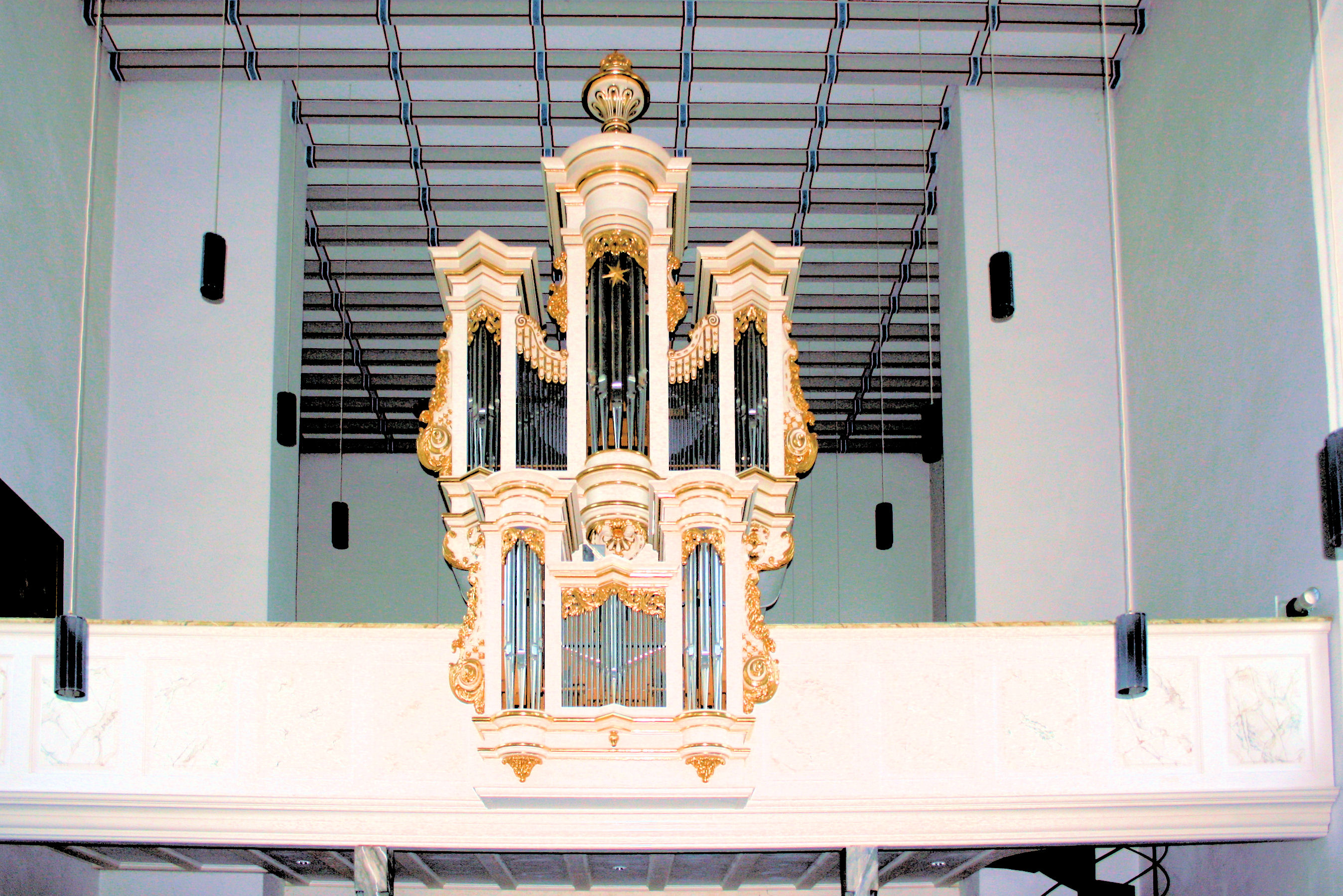 Stadt Blankenberg, St. Katharina, Orgel